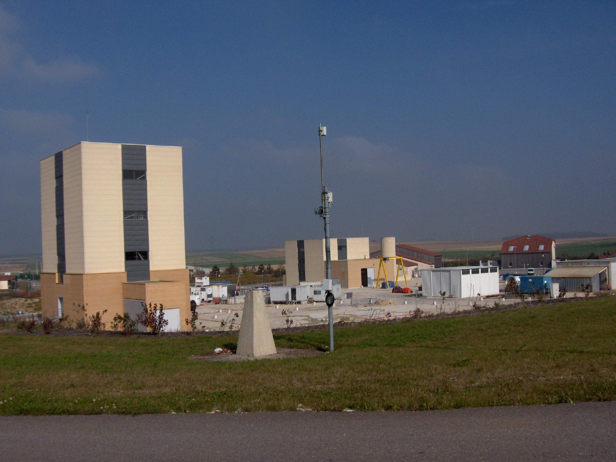 Tours coiffant les deux puits au Laboratoire de recherche souterrain de Meuse/Haute-Marne à Bure